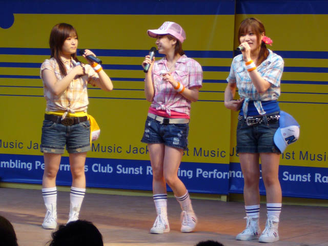 Tagalog: kuha ko ng bandang MUH~ sa isa sa mga live nilang pagtatanghal